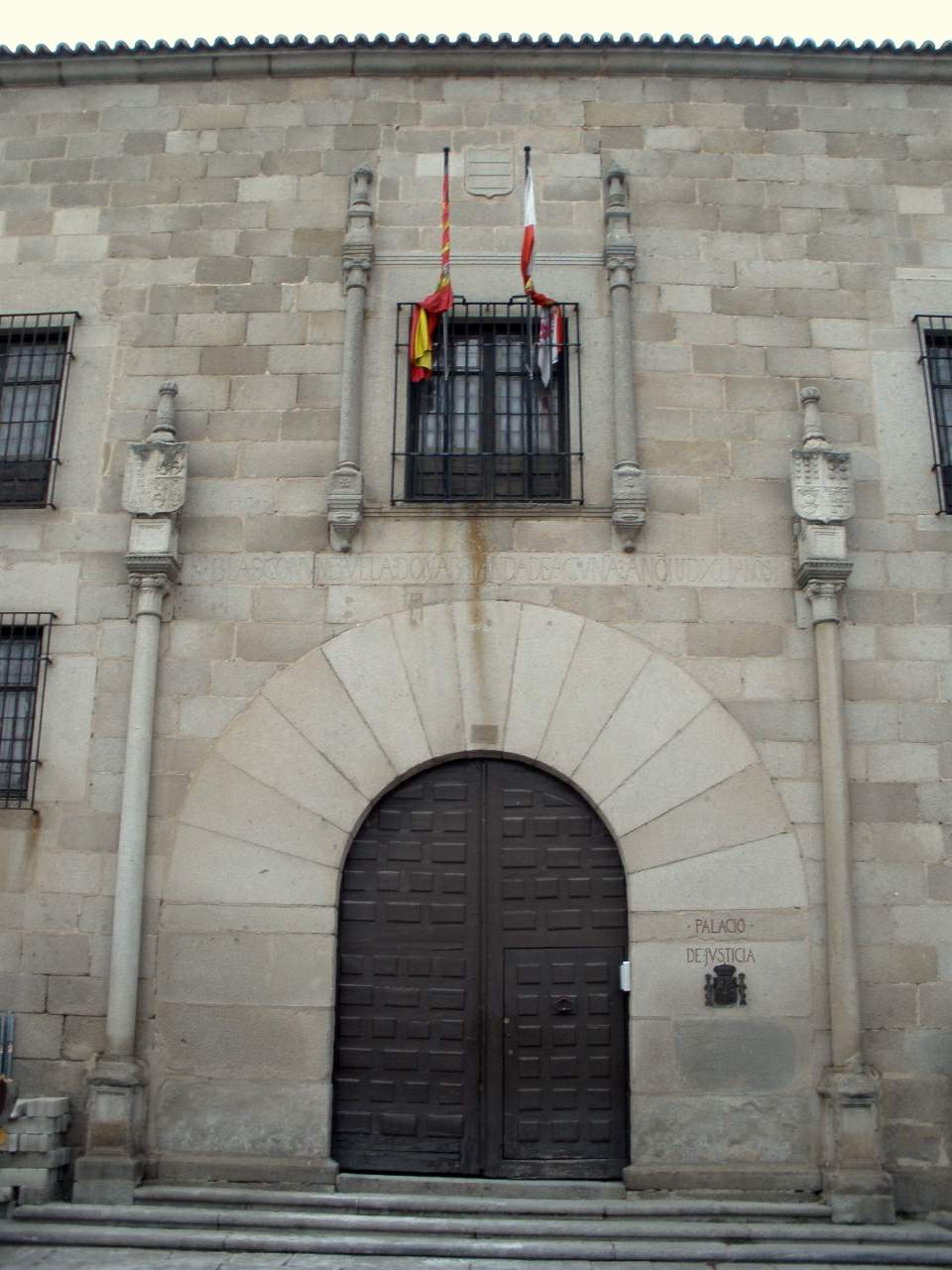 Avila - Palacio de Blasco Nuñez Vela (Audiencia Provincial)